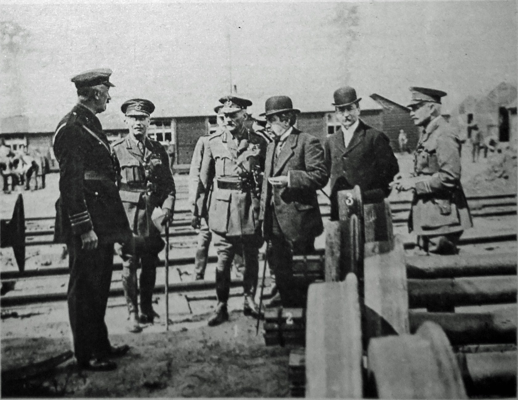 le Miroir N° 137, page 16 Briand visite les troupes britanniques avec le quartier maiter général Maxwell et son secrétaire aux affaires étrangères Théodore Tissier.